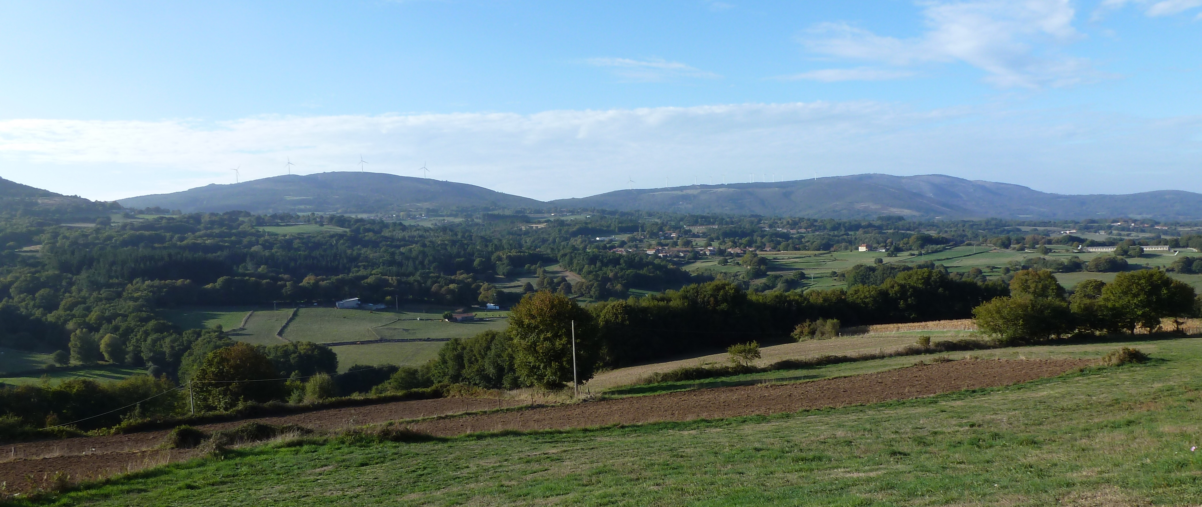 Vistas da Serra do Faro desde Santa Mariña do Castro